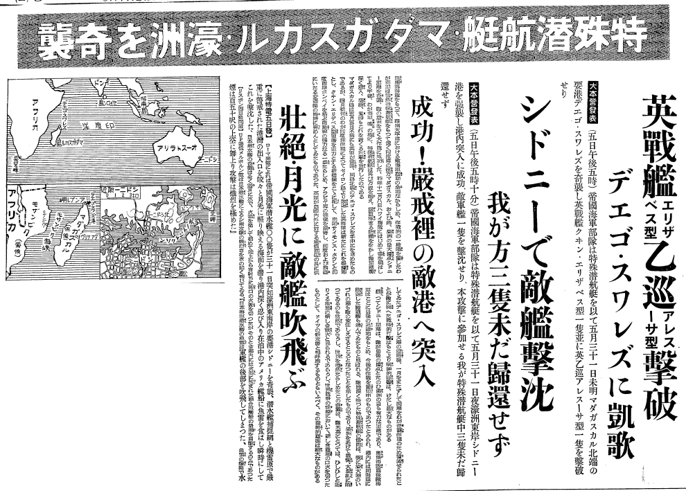 1942年（昭和17年）5月31日に日本海軍が行った特殊潜航艇による濠洲シドニー湾及びマダガスカルのディエゴ・スアレスに対する奇襲作戦を報道する新聞記事